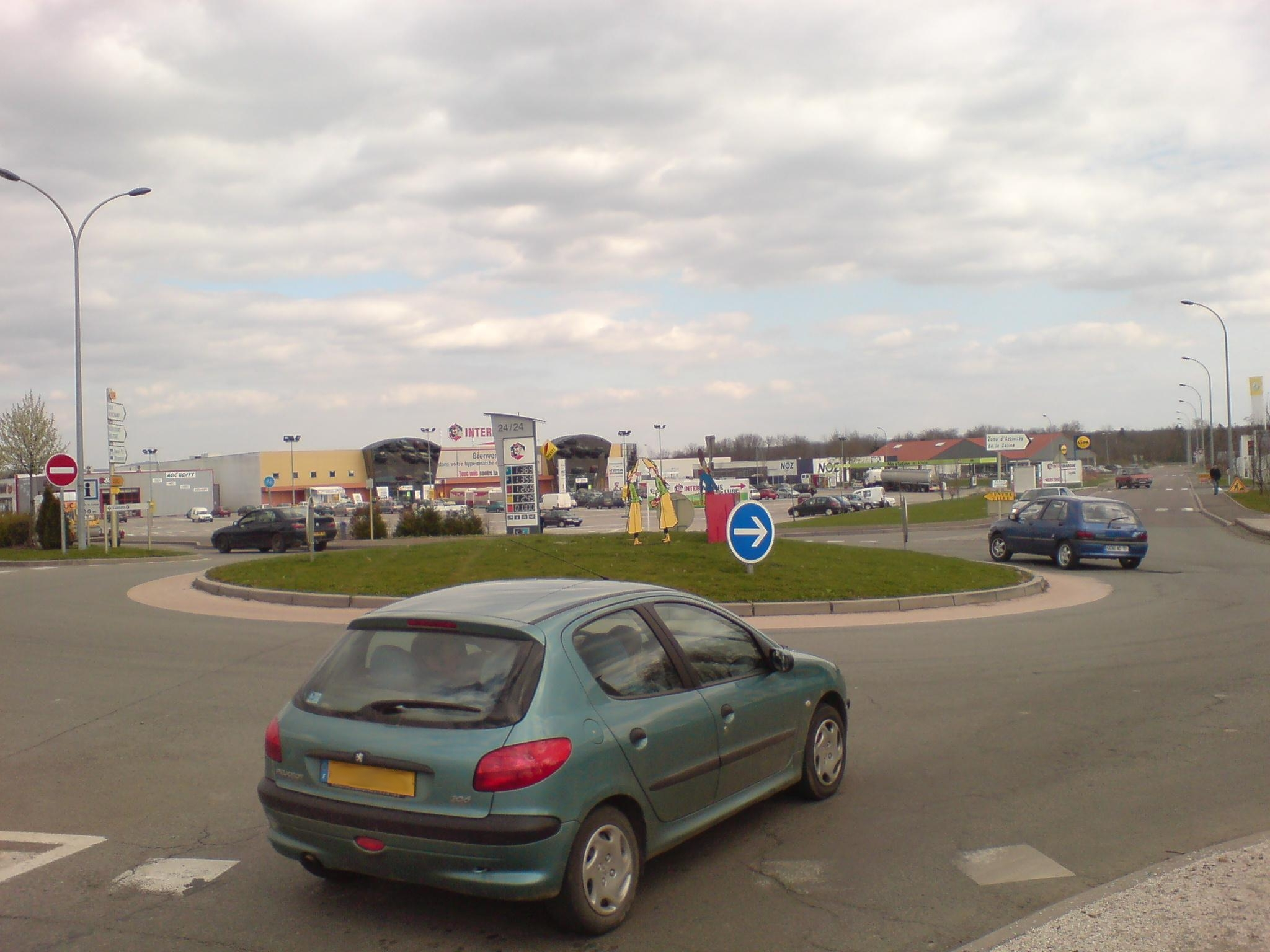 Zone commerciale de la Saline à Lure